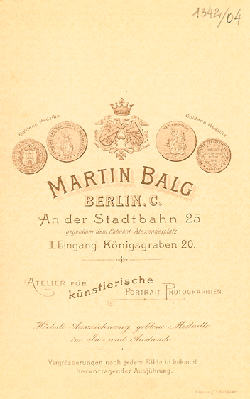 Revers eines Fotos von Martin Balg aus der Zeit, als sein Berliner Atelier die Adresse An der Stadtbahn 25 hatte (1899–1912)